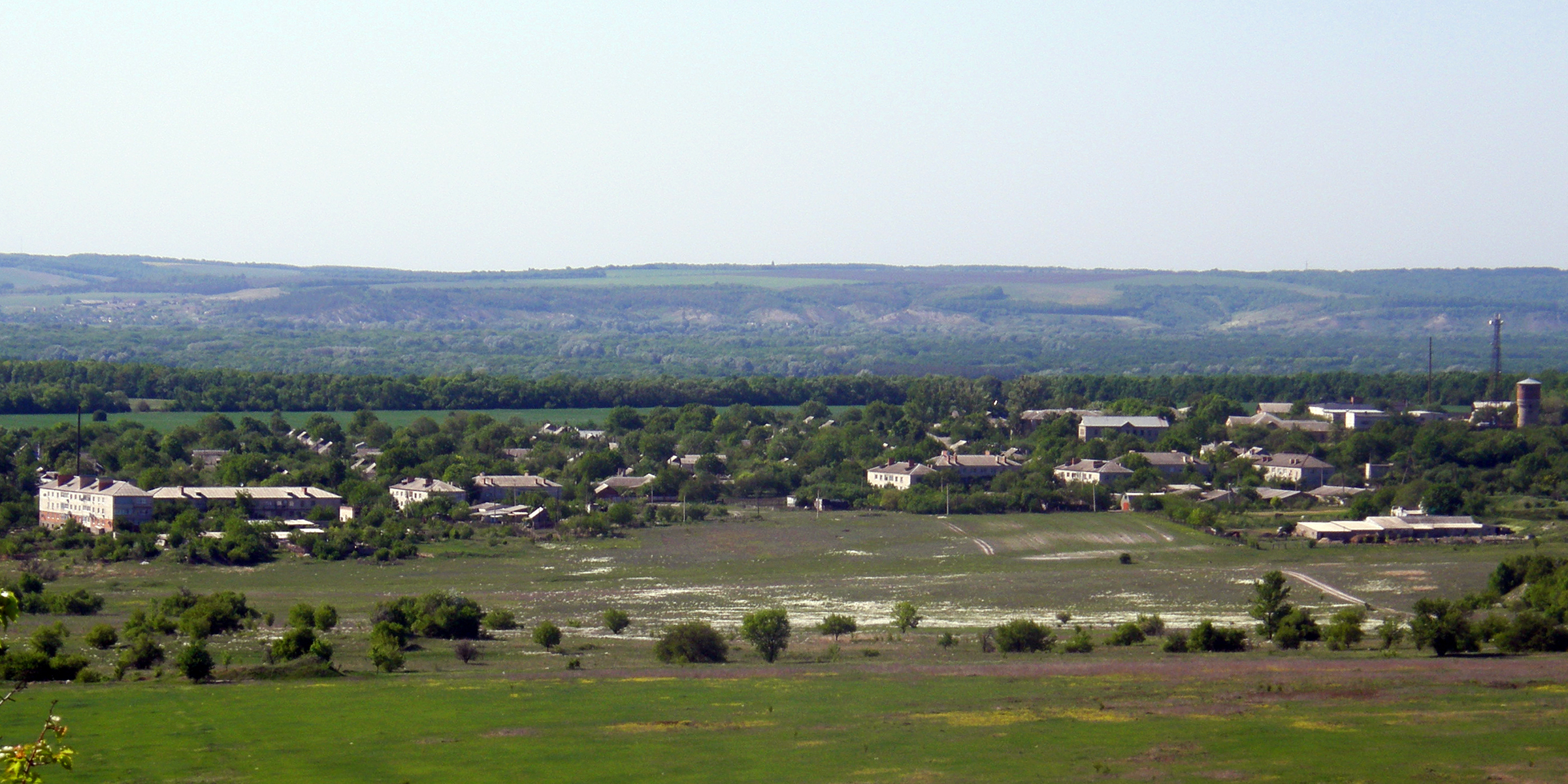 Донецкое